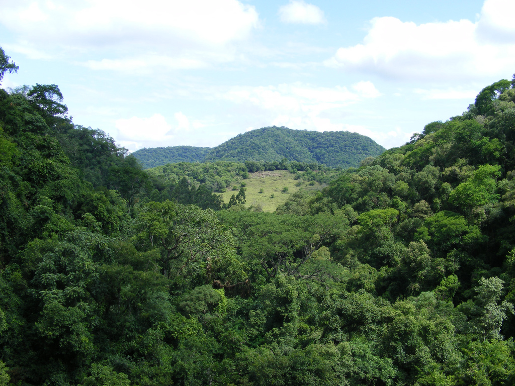 Floresta estacional decidual no Morro do Platô em Santa Maria, Rio Grande do Sul.